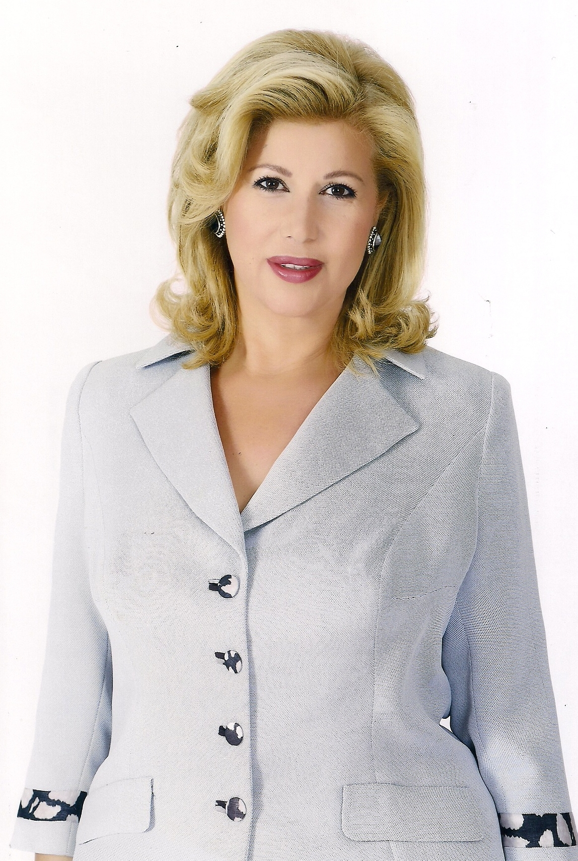 Dominique Ouattara Première Dame de Côte d'Ivoire